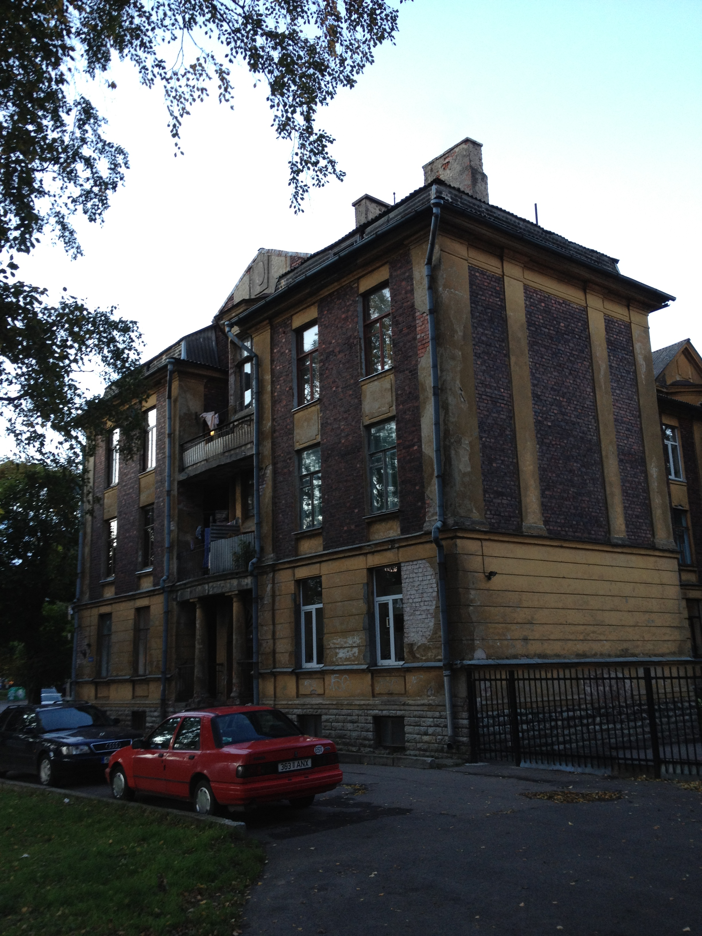 Peeter Suure merekindluse garnisoni üleajateenijate elamu Kopli tn 78, 1915. a.